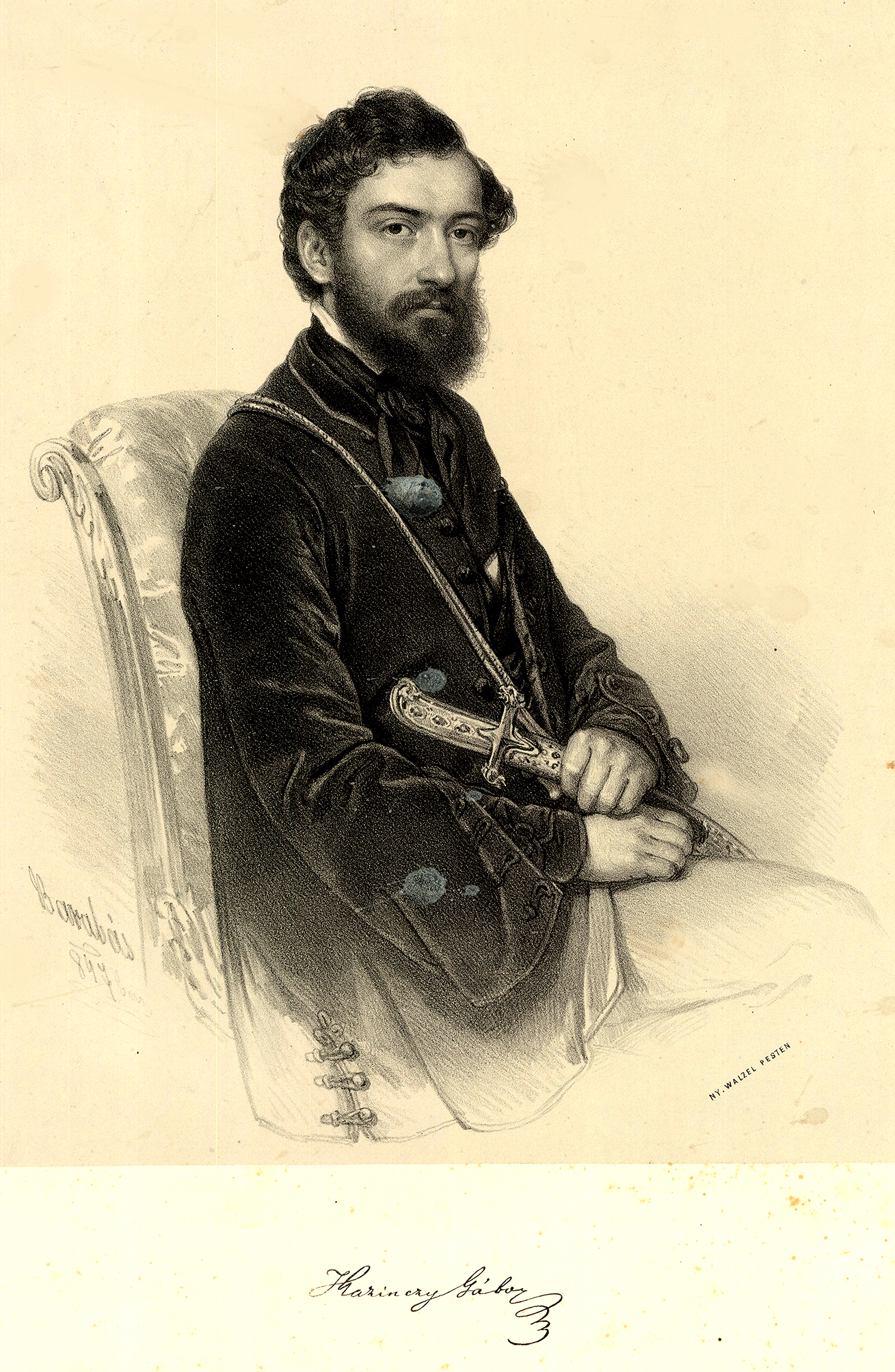 Kazinczi és alsóregmeczi Kazinczy Gábor (Berettő, 1818. július 18. – Bánfalva, 1864. április 18.) magyar országgyűlési képviselő, publicista, műfordító, az MTA levelező tagja, a Kisfaludy Társaság rendes tagja.